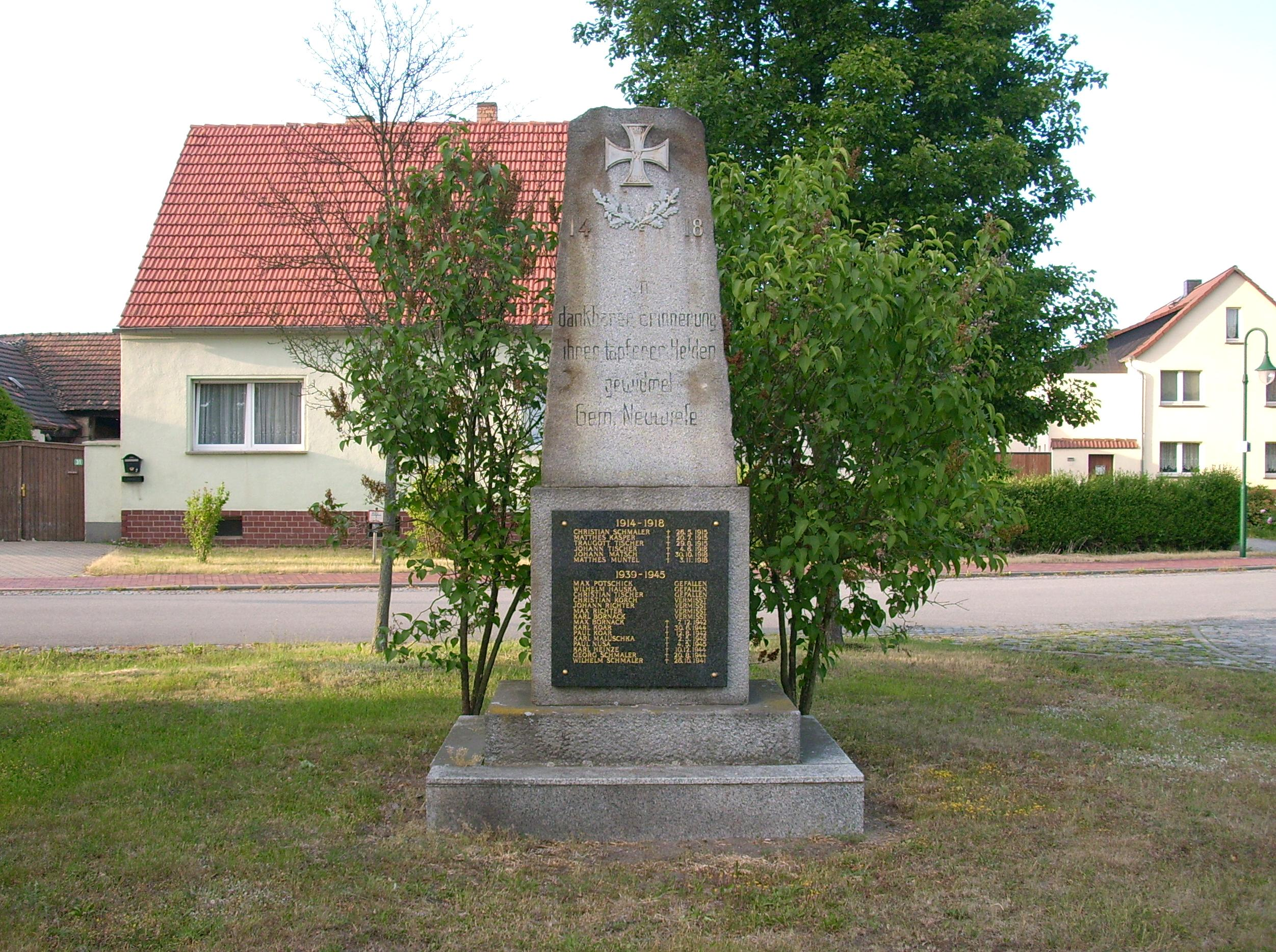 Kriegerdenkmal in Neuwiese (Elsterheide) Hornjoserbsce: Wojerski pomnik na nawsy w Nowej Łuce